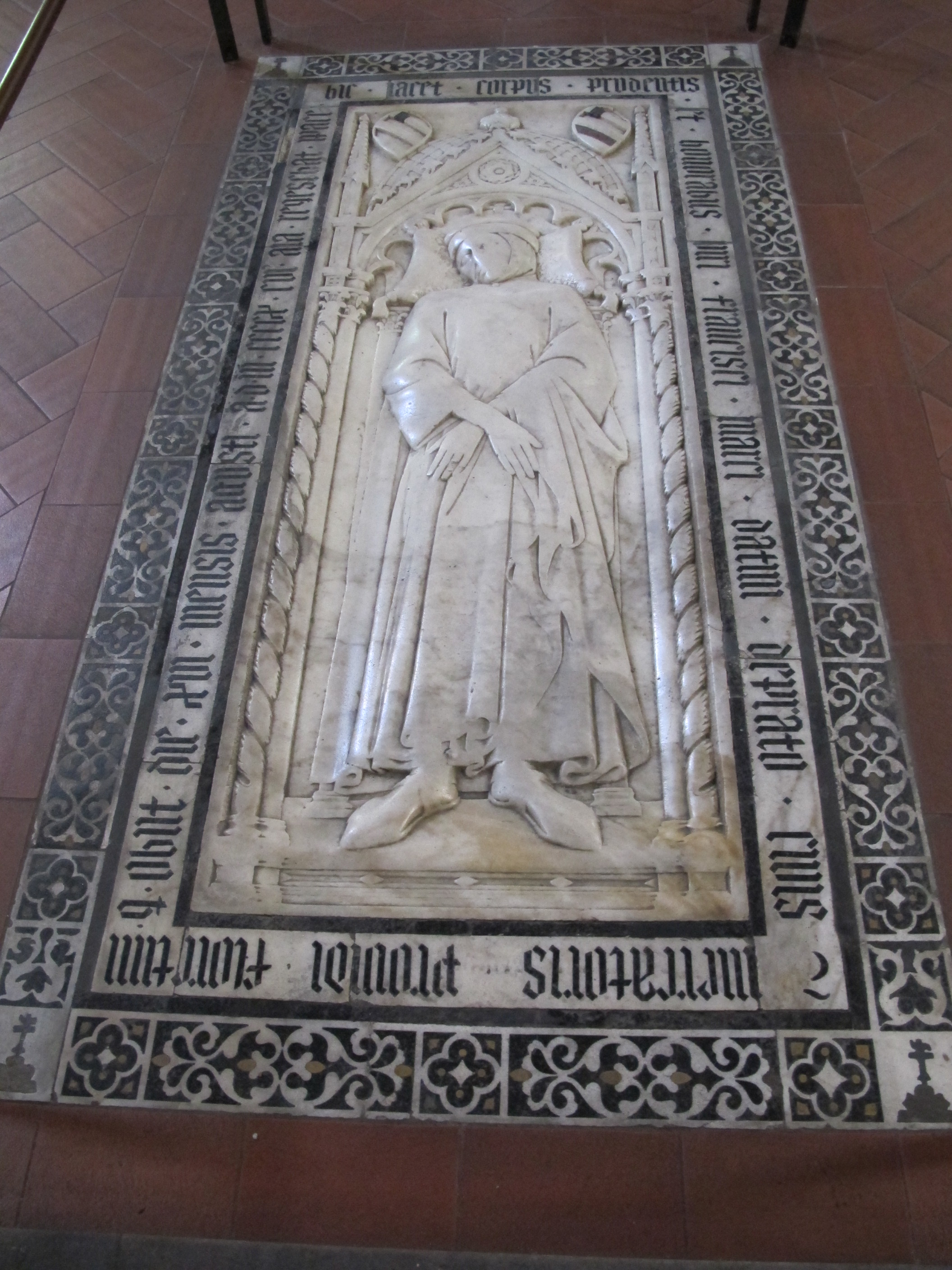 San francesco, po, interno, tomba francesco datini